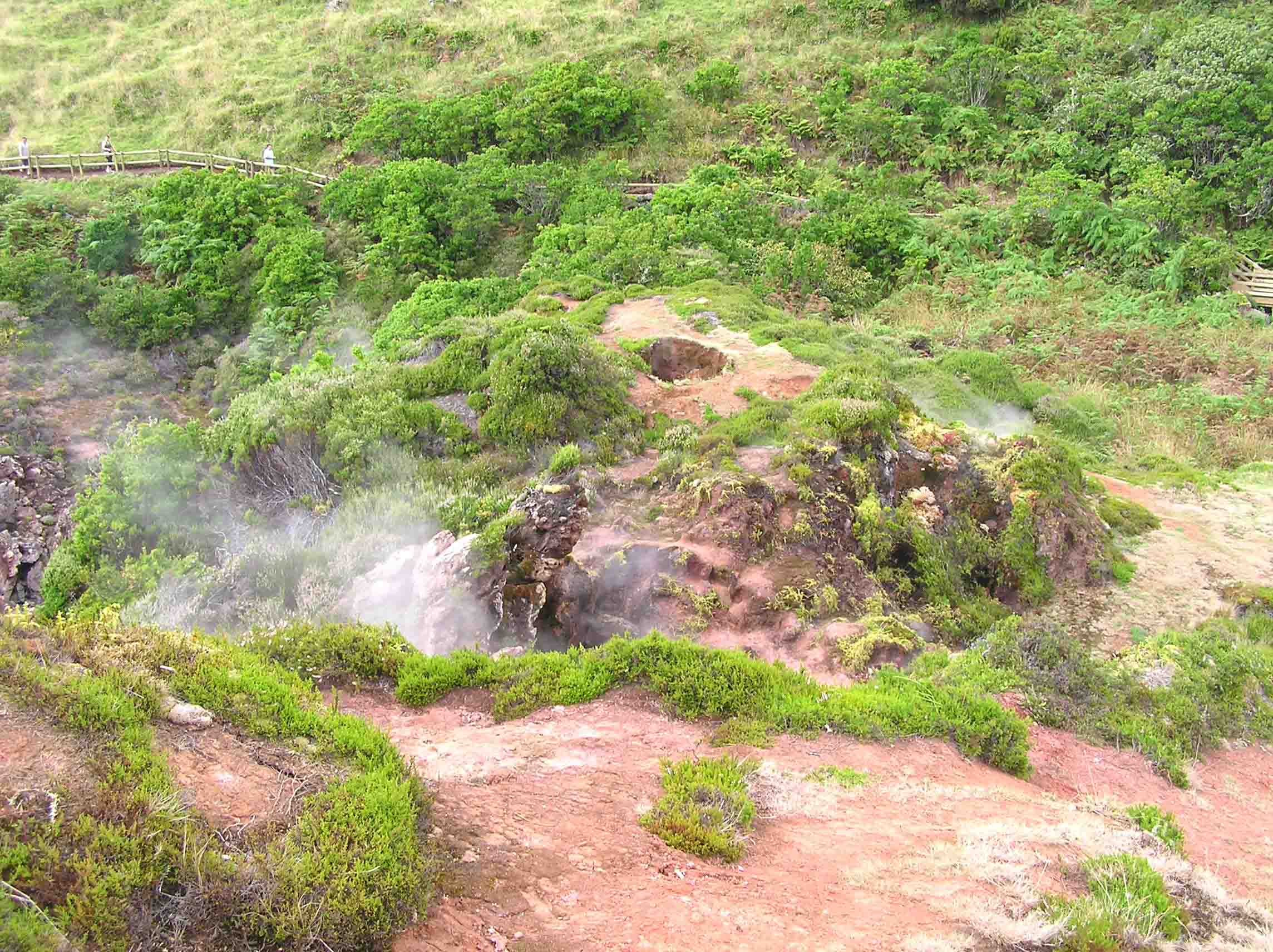 Furnas do Enxofre, ilha Terceira, Açores, Portugal